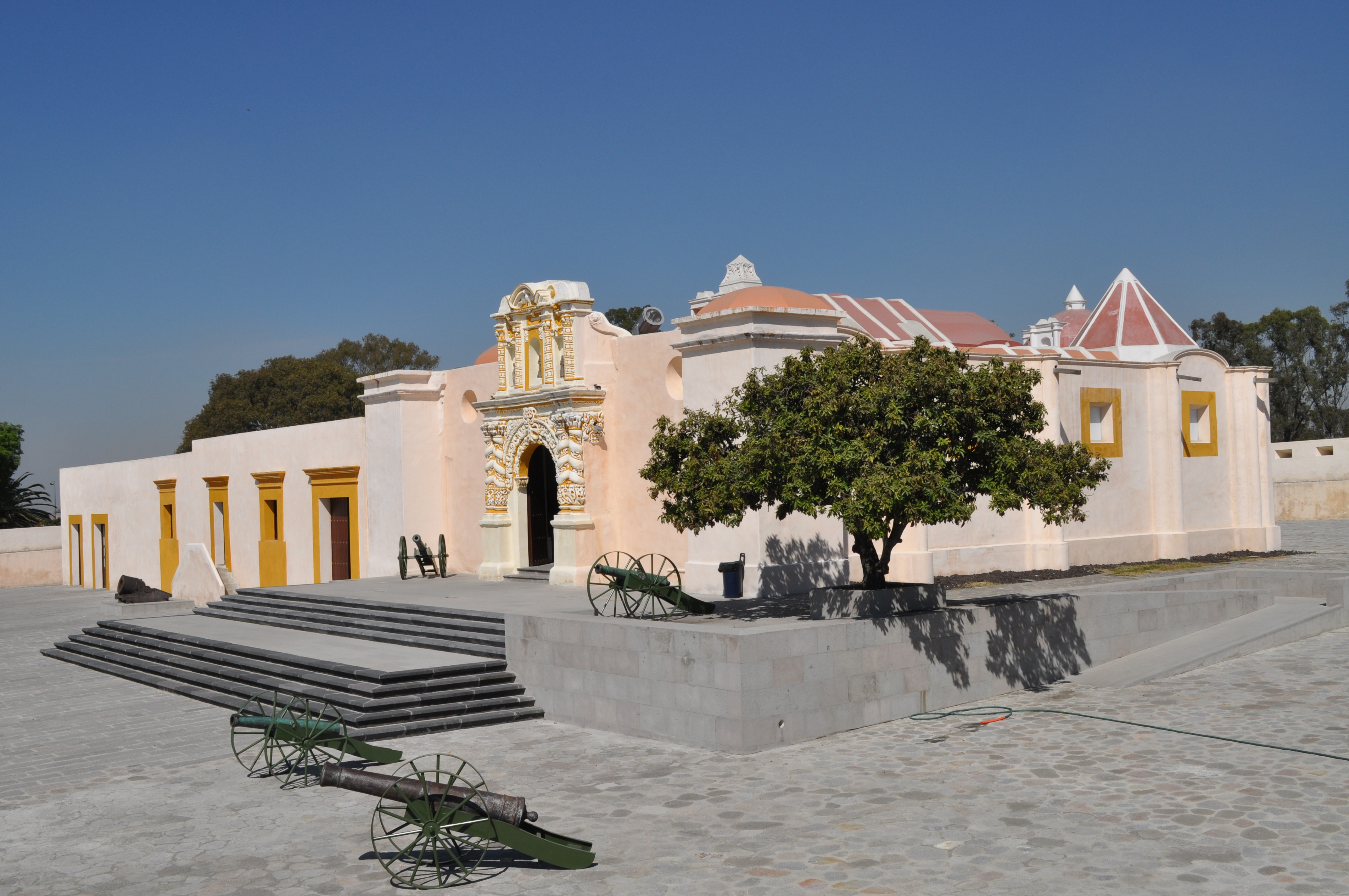 Antiguo Fuerte de Loreto